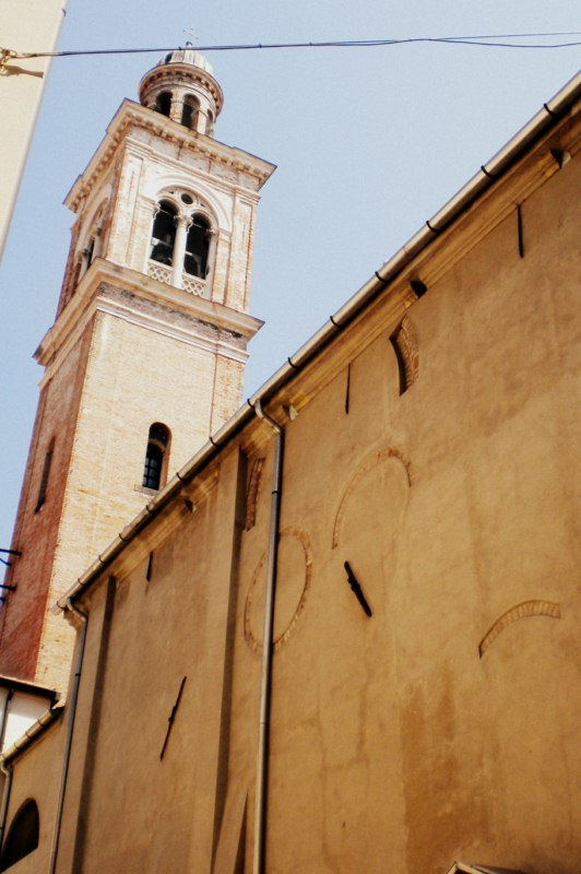 Fiancata e campanile della chiesa di Sant'Andrea a Padova